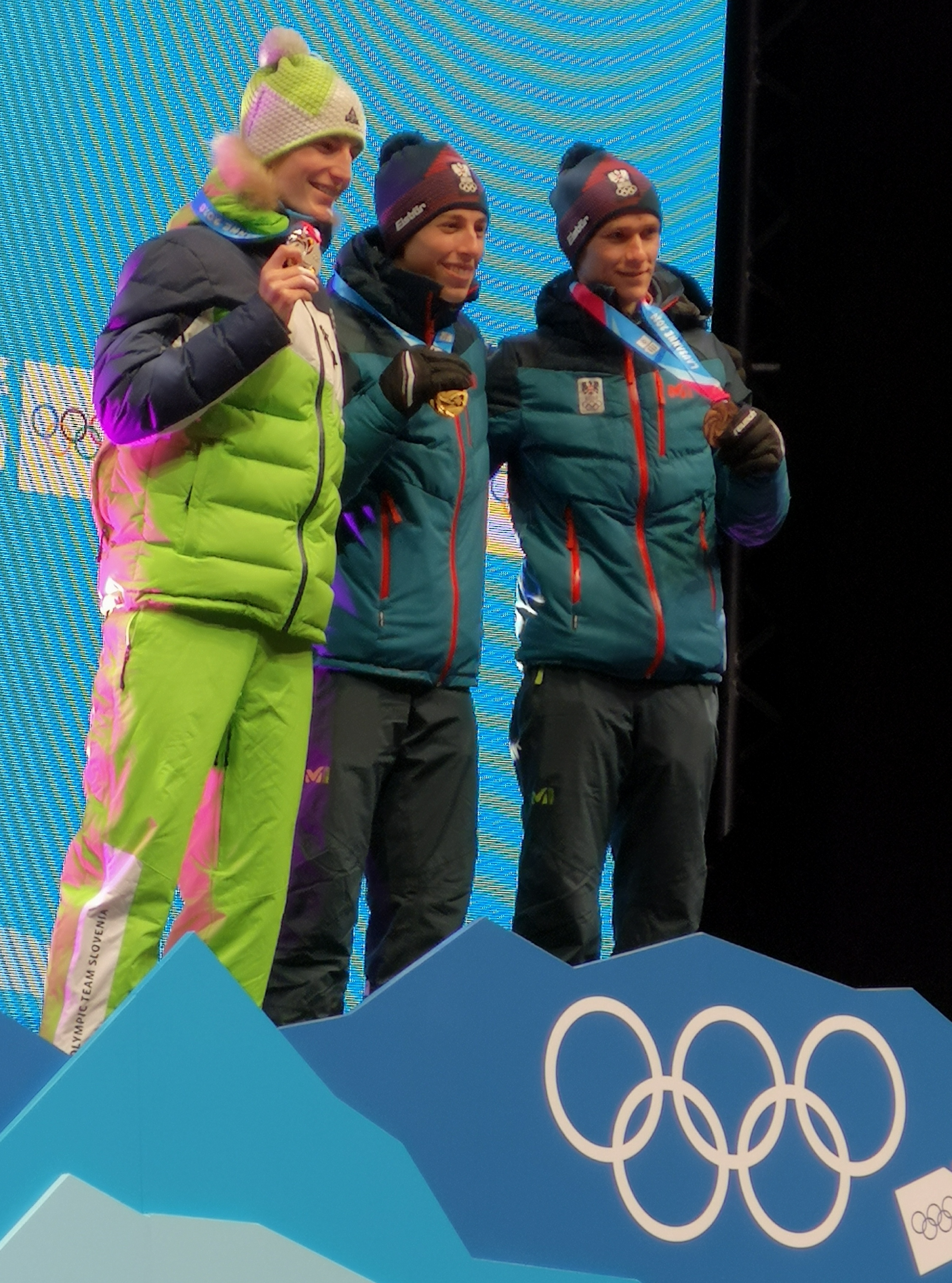 Le podium du saut à ski masculin individuel des JOJ de Lausanne 2020 : Marco Wörgötter (AUT), Mark Hafnar (SLO) et David Haagen (AUT).